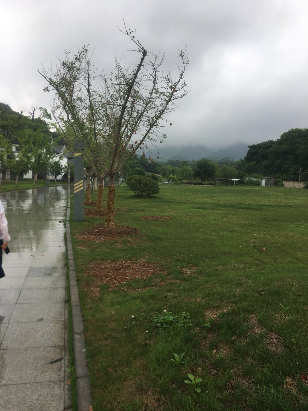 中文（中国大陆）: 敬亭山的图片4